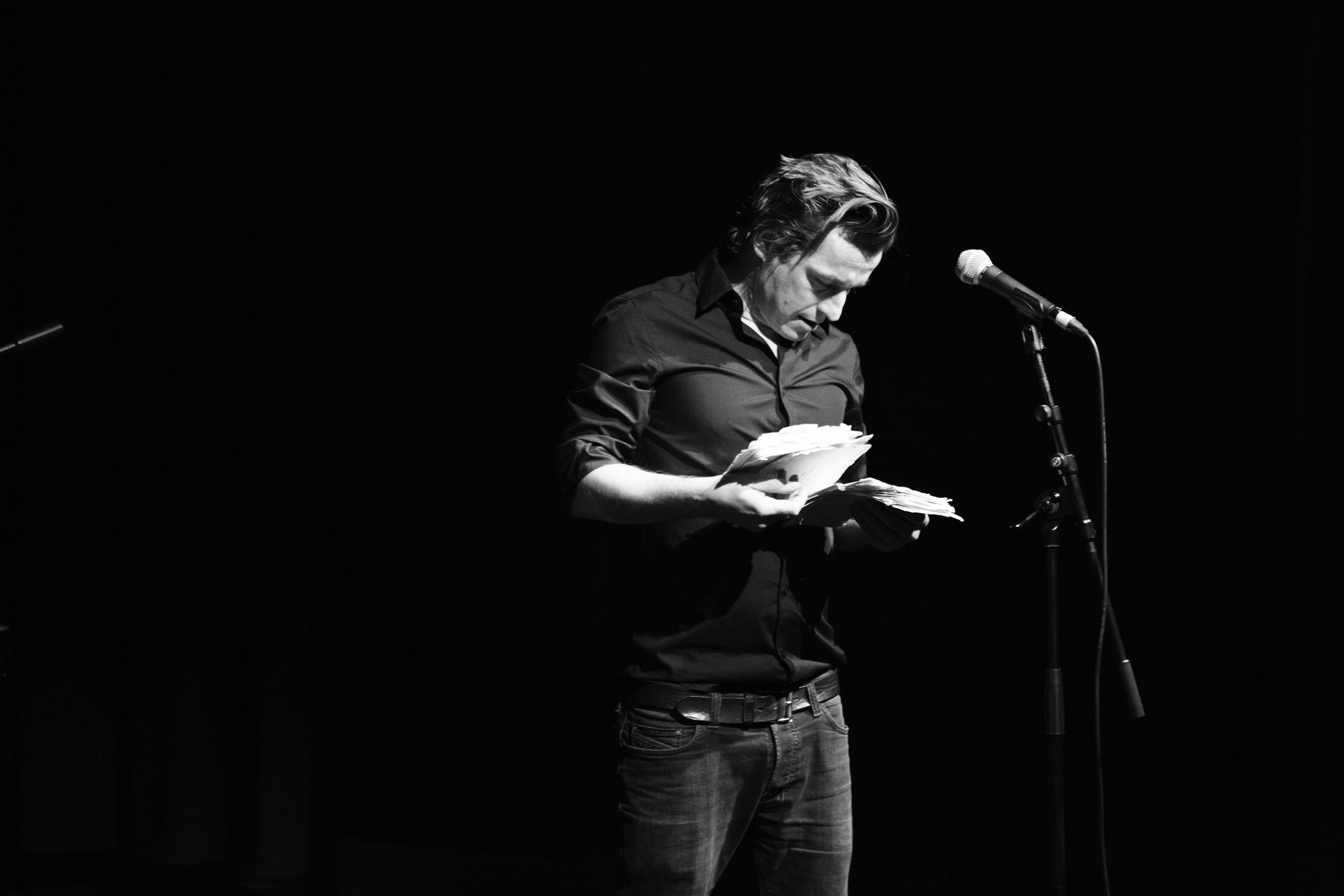 Copyright: Janosch Abel Photography